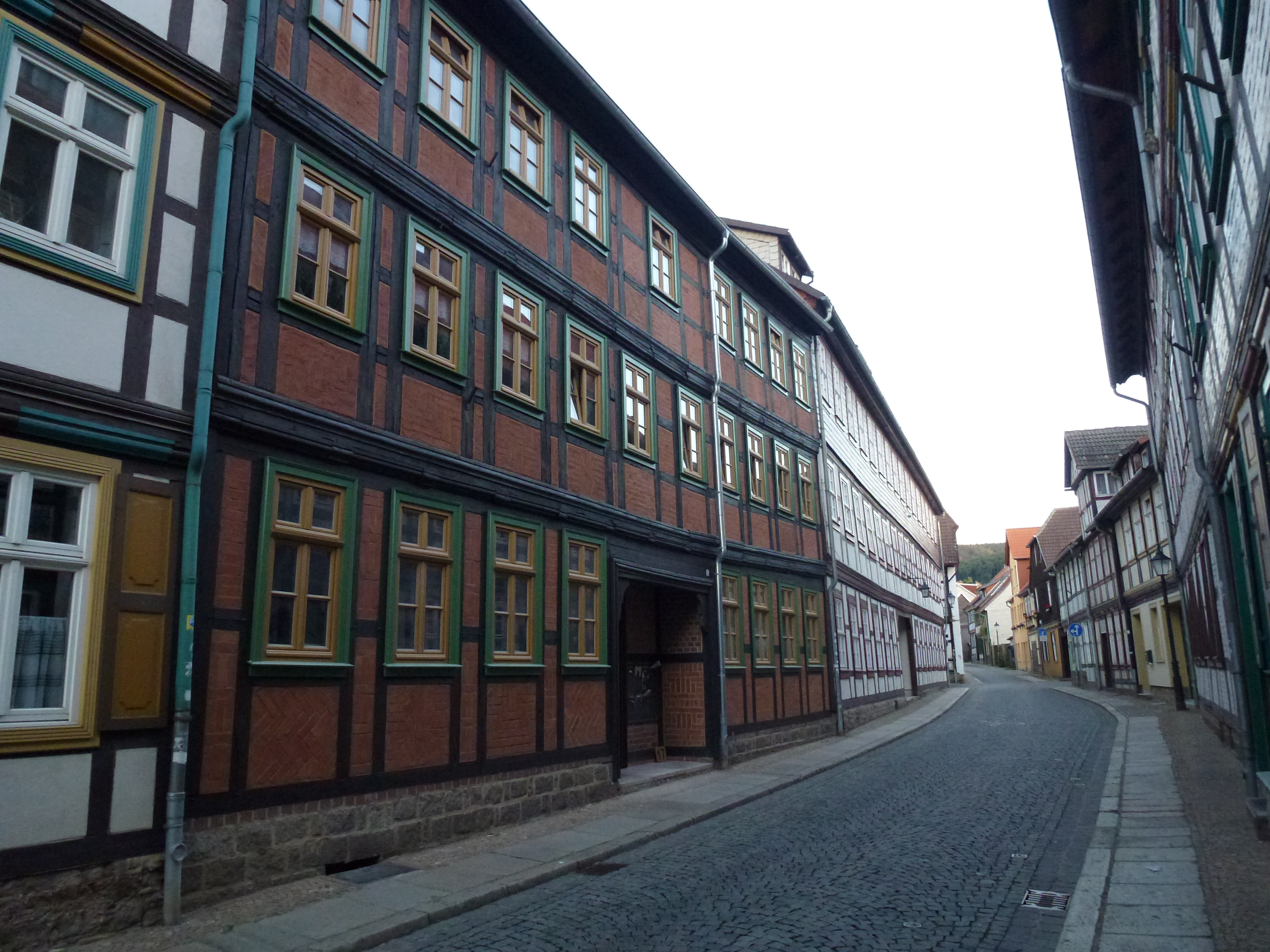 Das Haus in der Kochstraße 17 wurde um 1760 erbaut